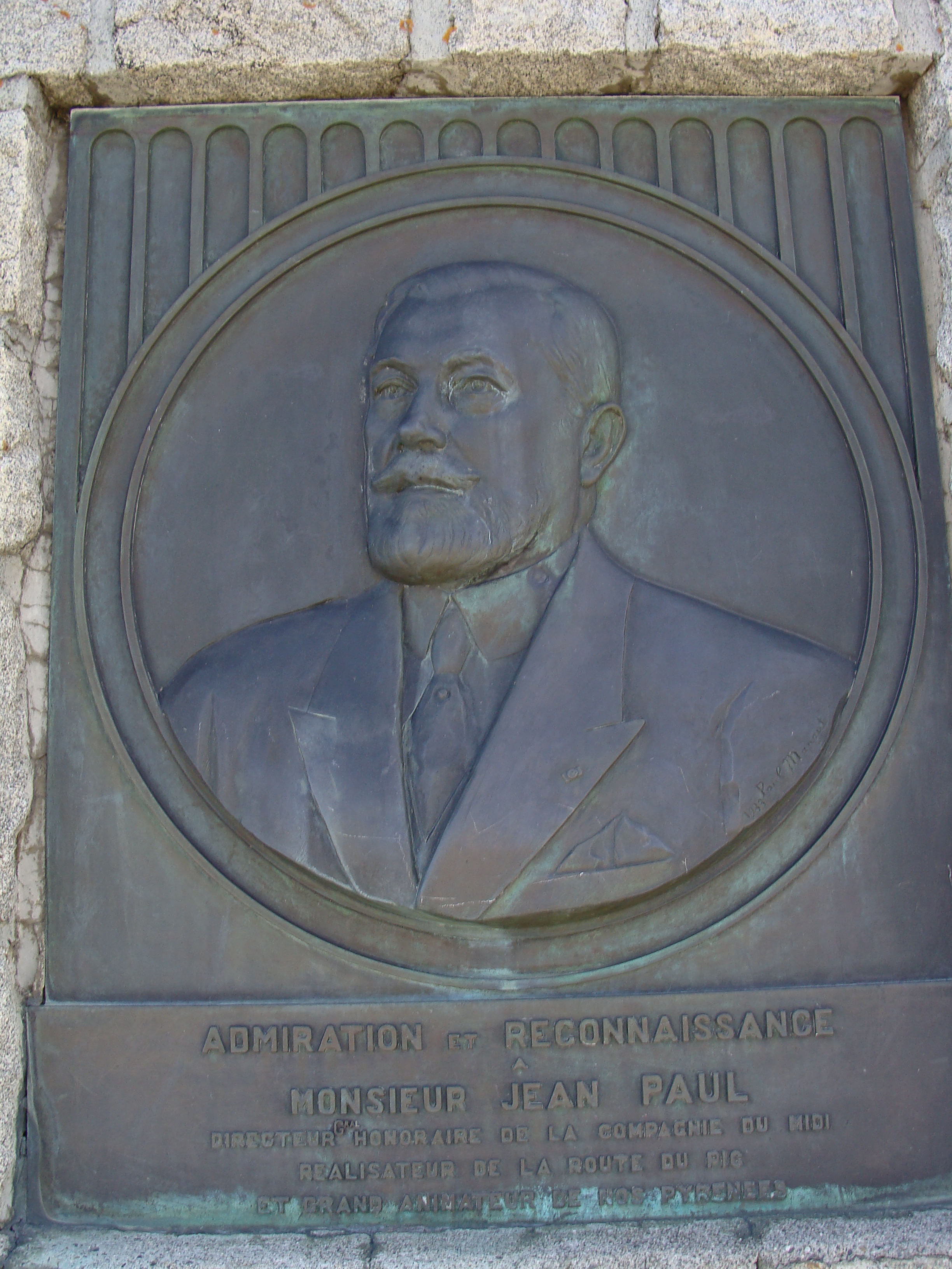 Col du Tourmalet - Plaque commémorative à M. Jean Paul - Directeur général de la compagnie du Midi et administrateur des Pyrénées